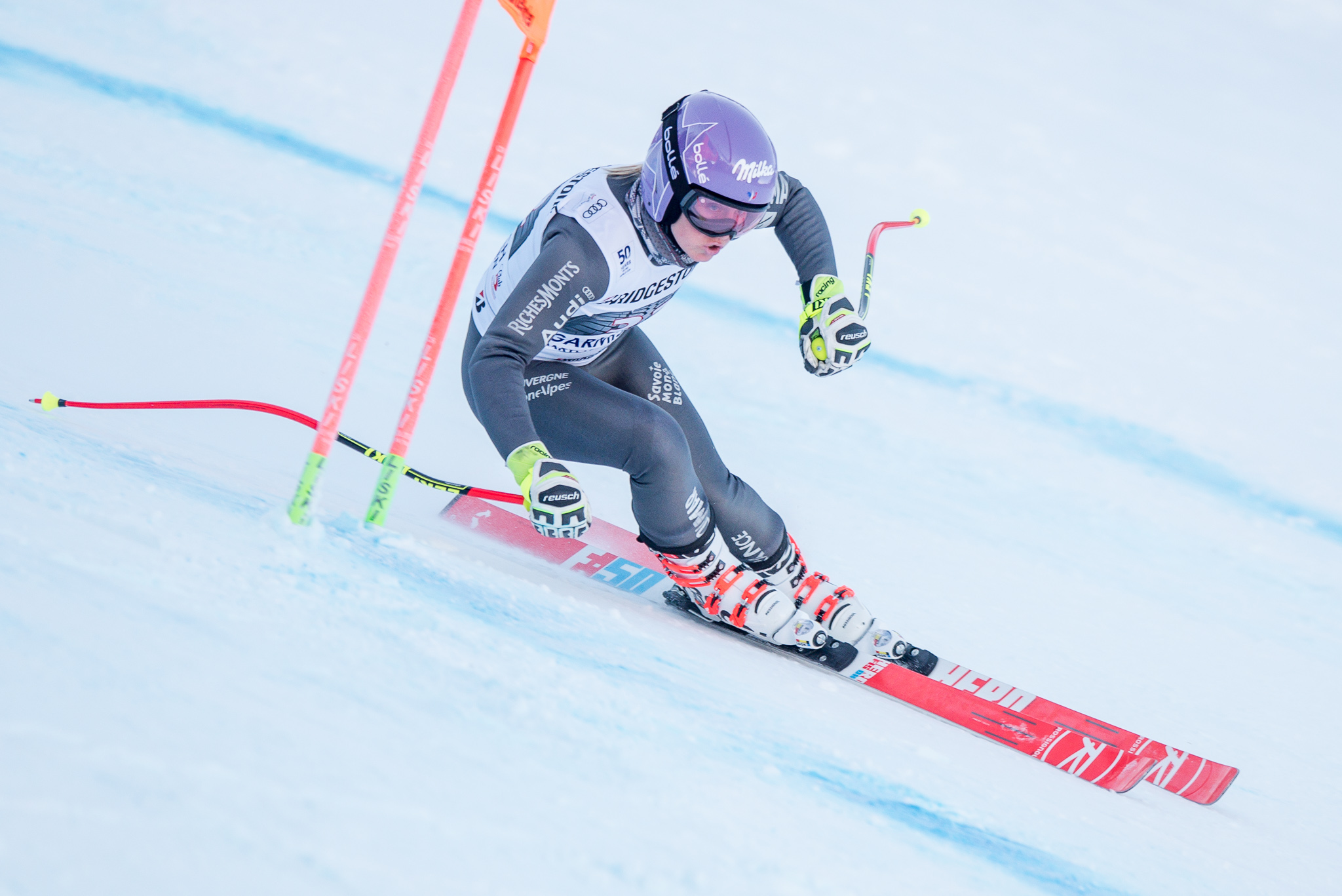 64. Kandahar Rennen,Audi FIS Ski Weltcup Garmisch-Partenkirchen,Damen Abfahrt,Kandahar,Ladies Downhill,Tessa Worley